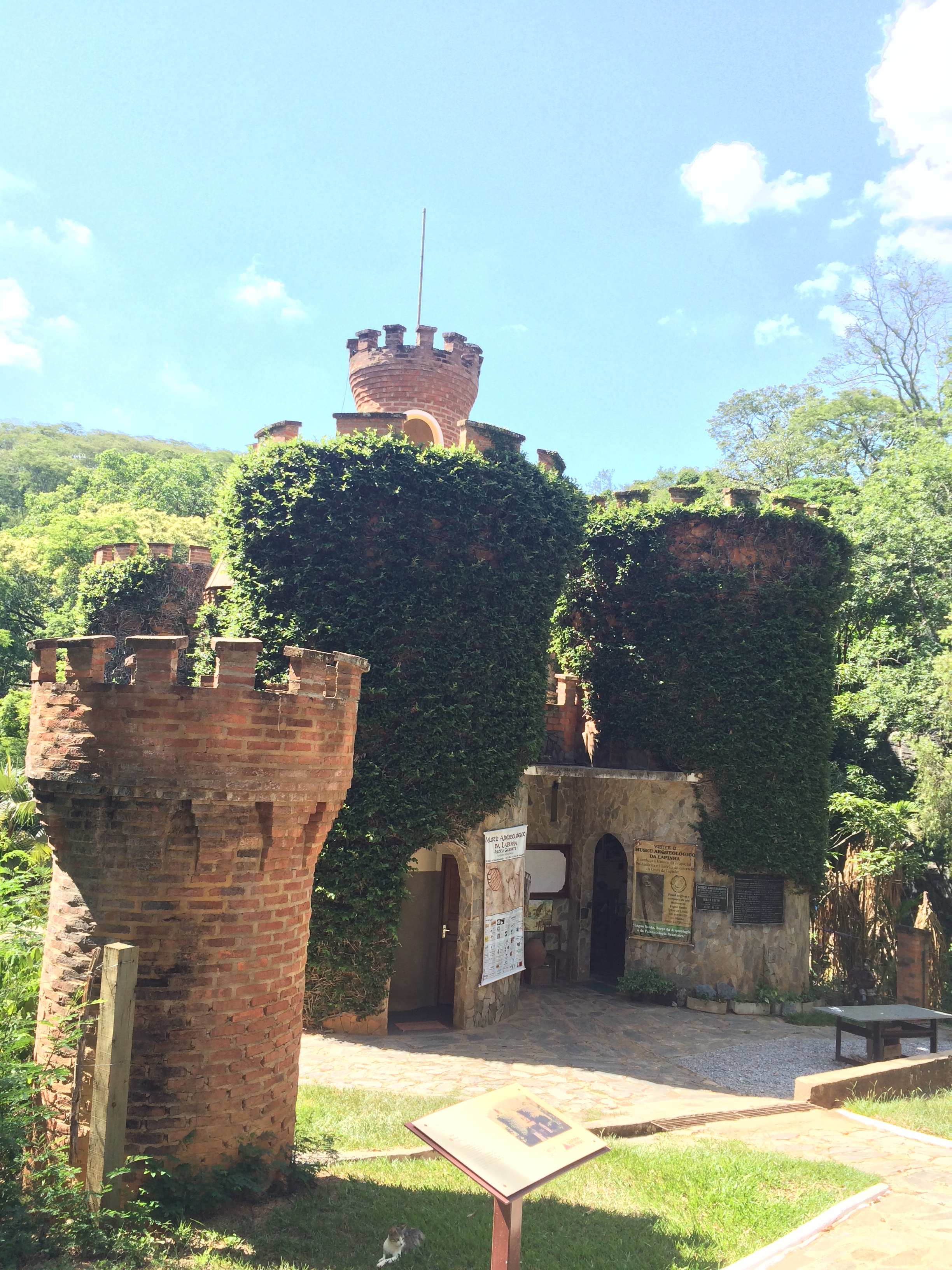 Gruta da Lapinha - Castelo da Lapinha, Lagoa Santa - MG